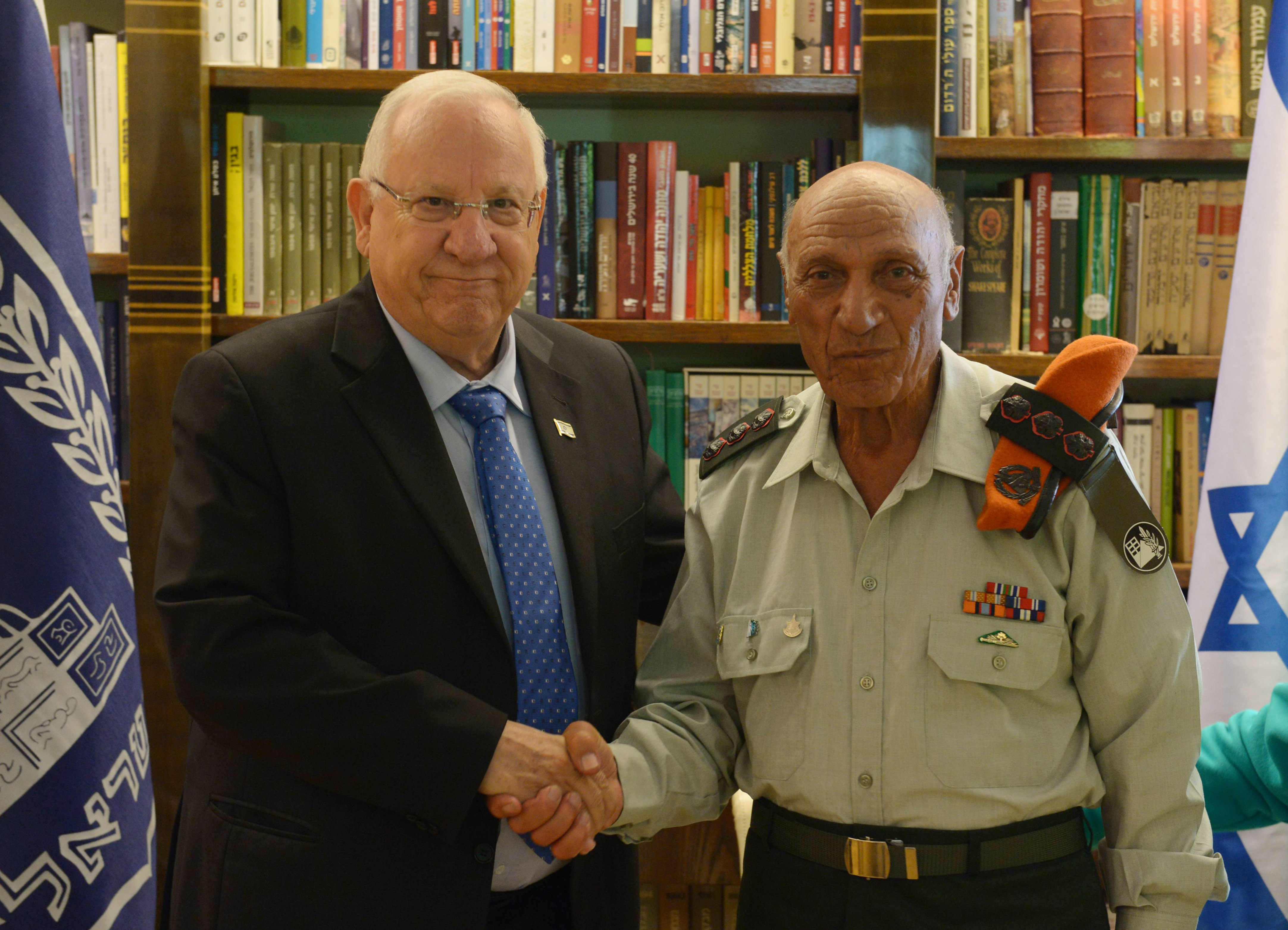 נשיא מדינת ישראל ראובן ריבלן מקבל בלשכתו את אל״מ דוד רוקני מימין, המפקד על טקס הדלקת המשואות ביום העצמאות מעל 35 שנים. הביקור לרגל פרישתו מהתפקיד